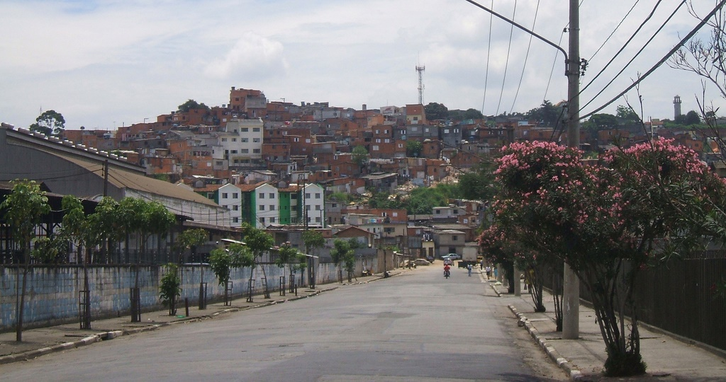 Favela Vila Nova Jaguaré, no distrito do Jaguaré, cidade de São Paulo, Brasil